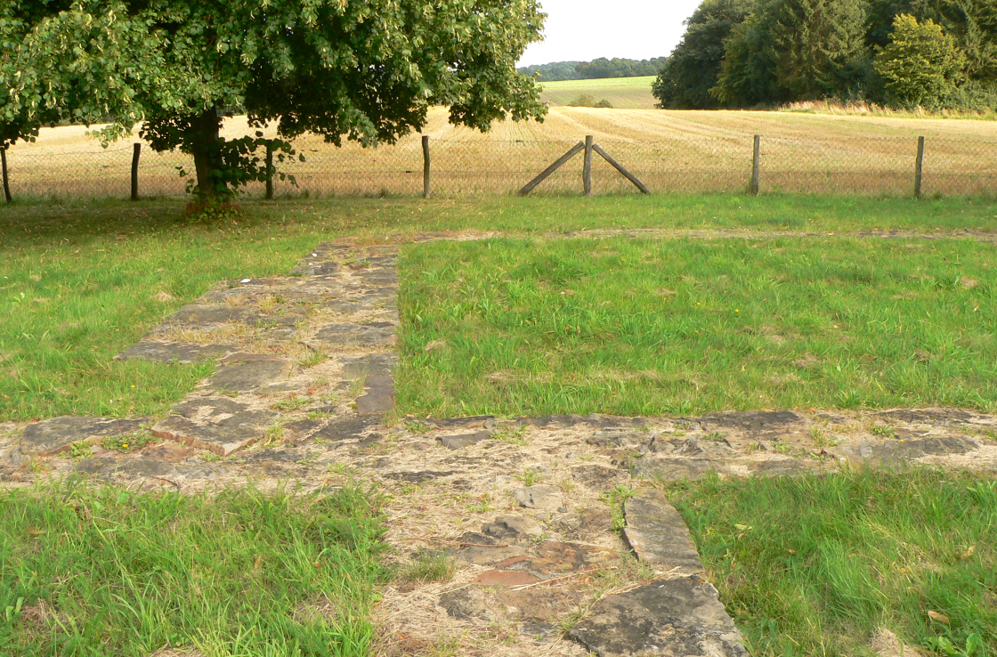 Ausgegrabene Fundamente des Stift Asbeke, Blick auf die Rehburger Berge